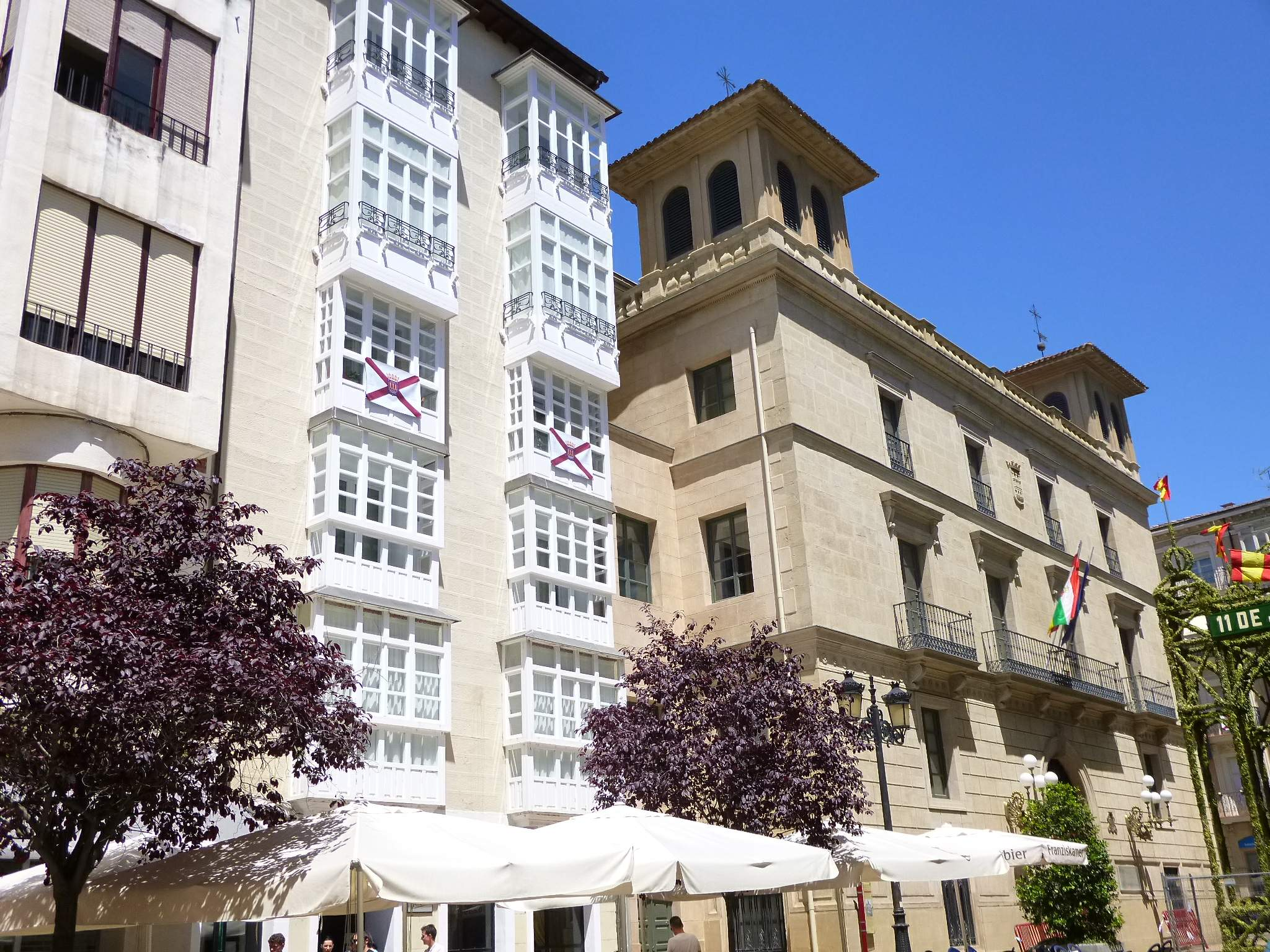 Calle Portales de Logroño